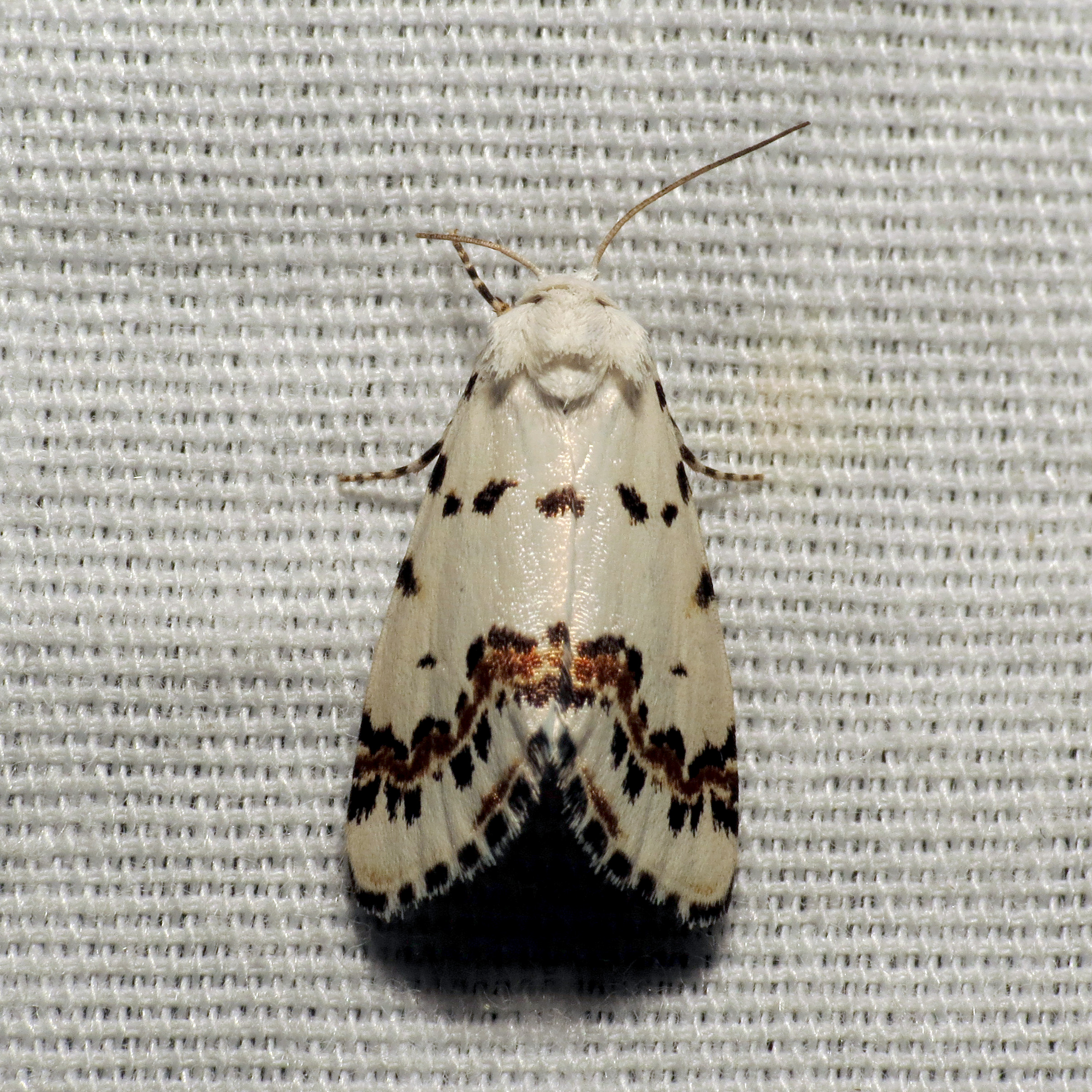 Grotella tricolor. Gordon Hirabayashi Recreation Area, Santa Catalina Mountains, Pima County, Arizona, USA.